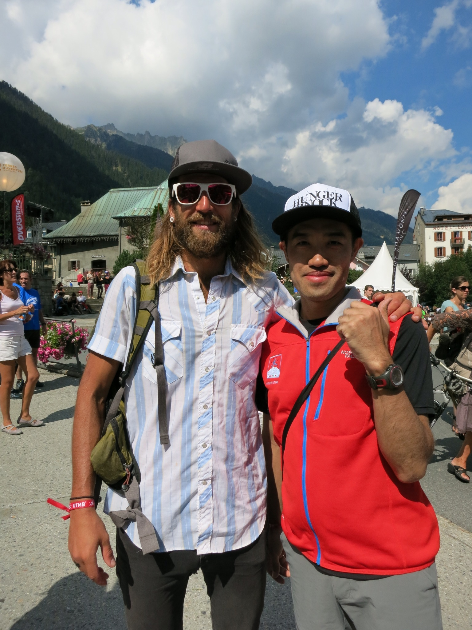 Anton Krupicka (left) famous trail runner